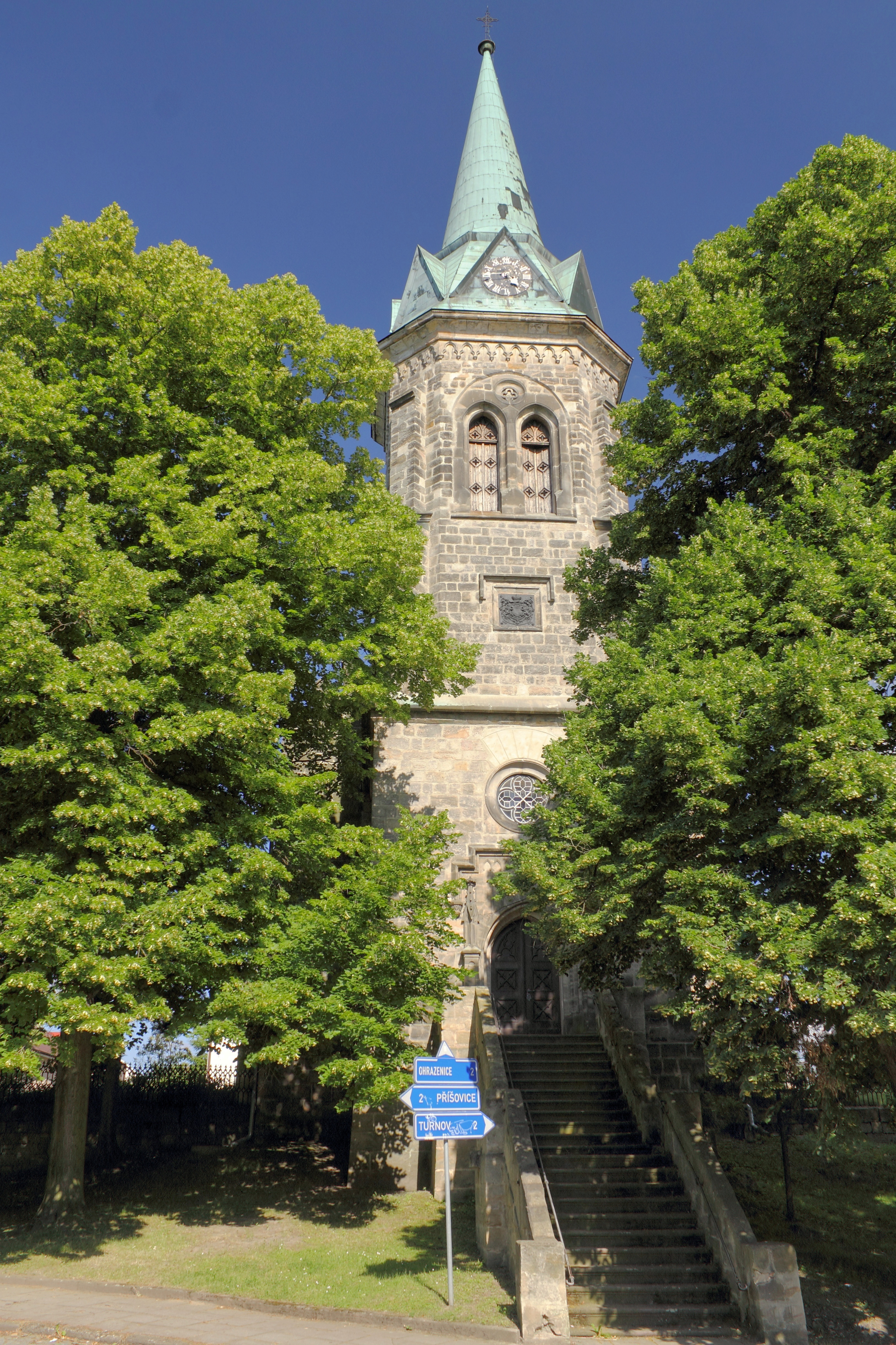 Kostel sv. Jakuba v Přepeřích